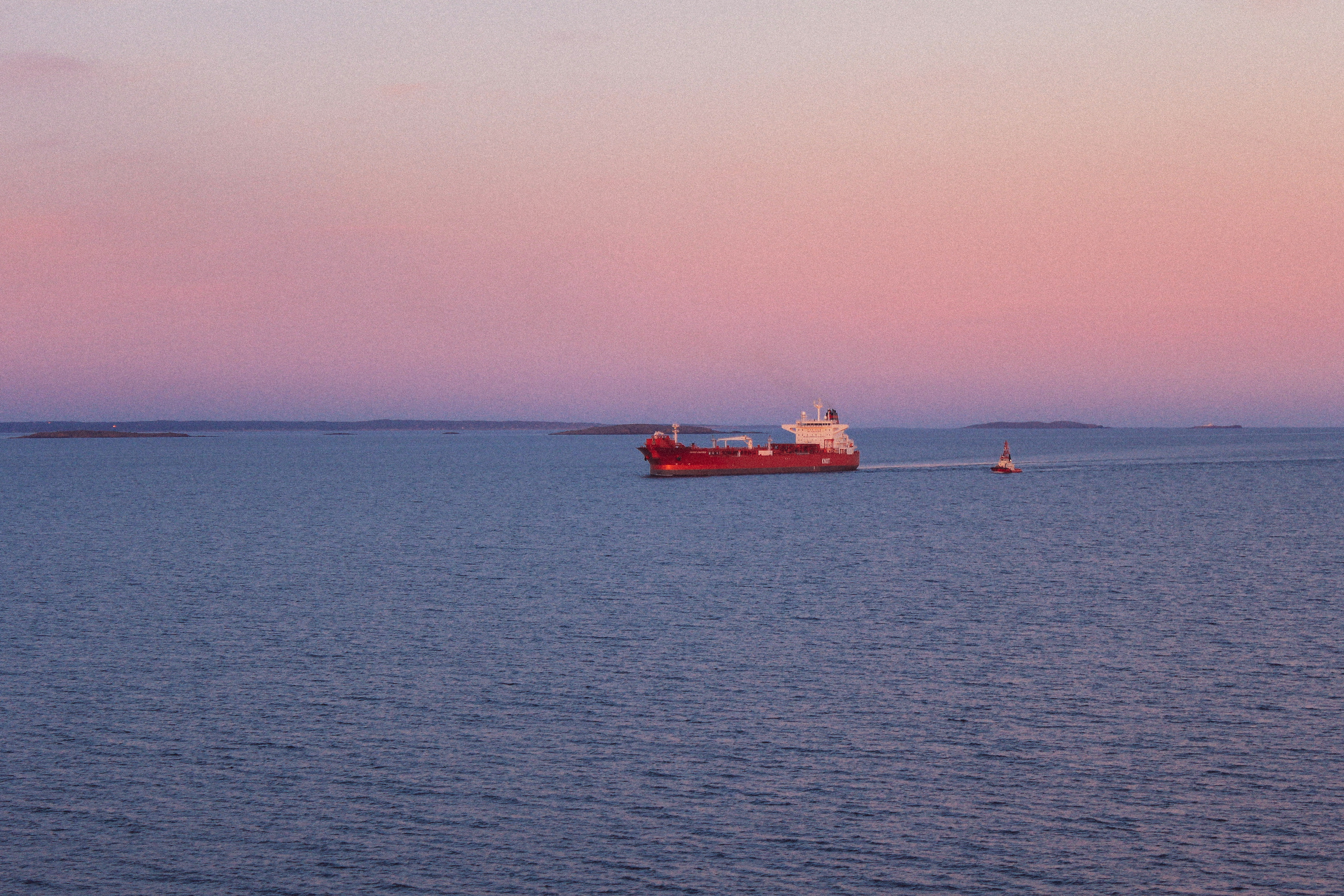 Fraktebåt i Skagerrak.